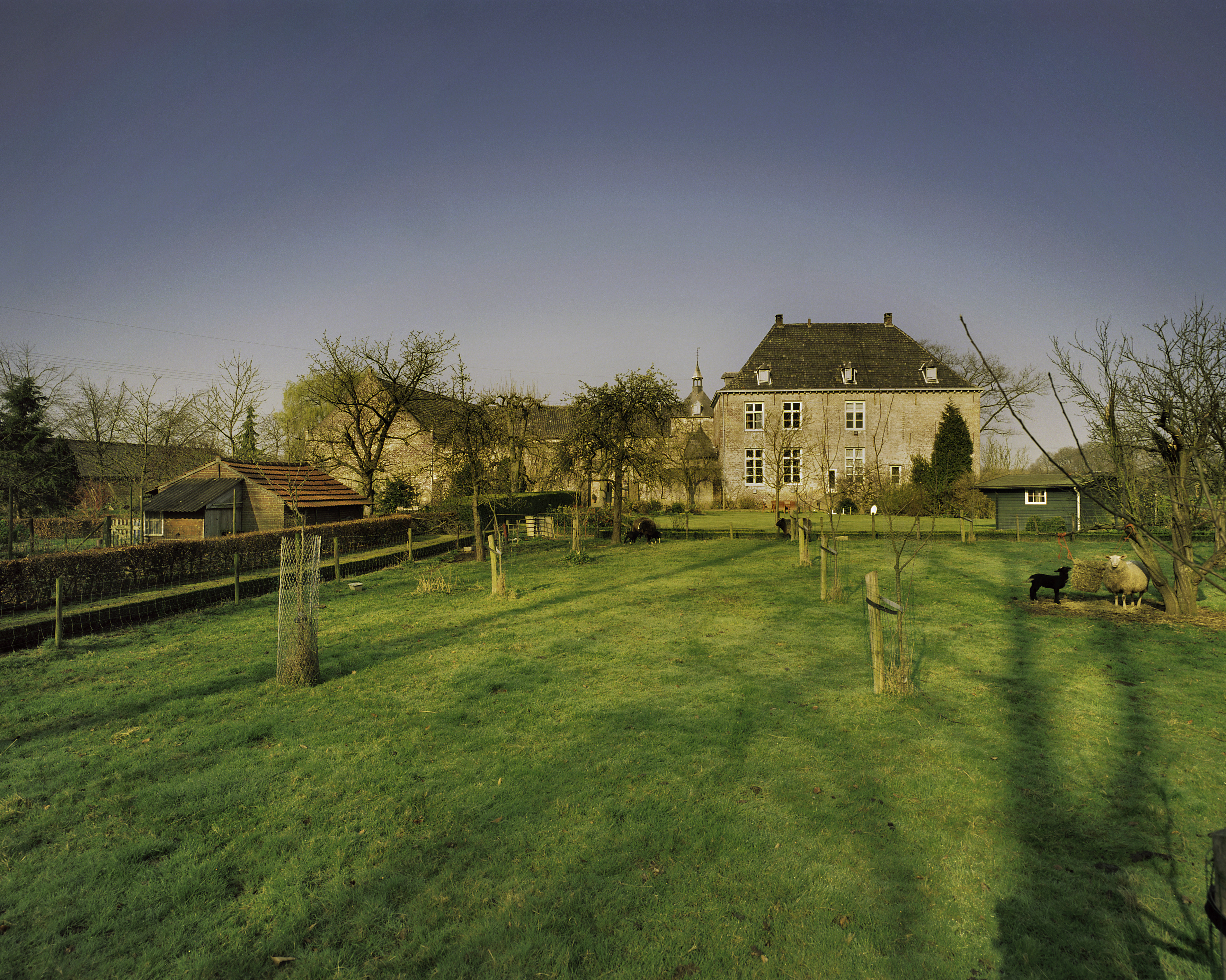 Huis Zuidwijk - Spick: Overzicht van de kasteelboerderij (opmerking: Gefotografeerd voor Kastelen in Limburg (1000-1800), Burchten en landhuizen, bladzijde 192)